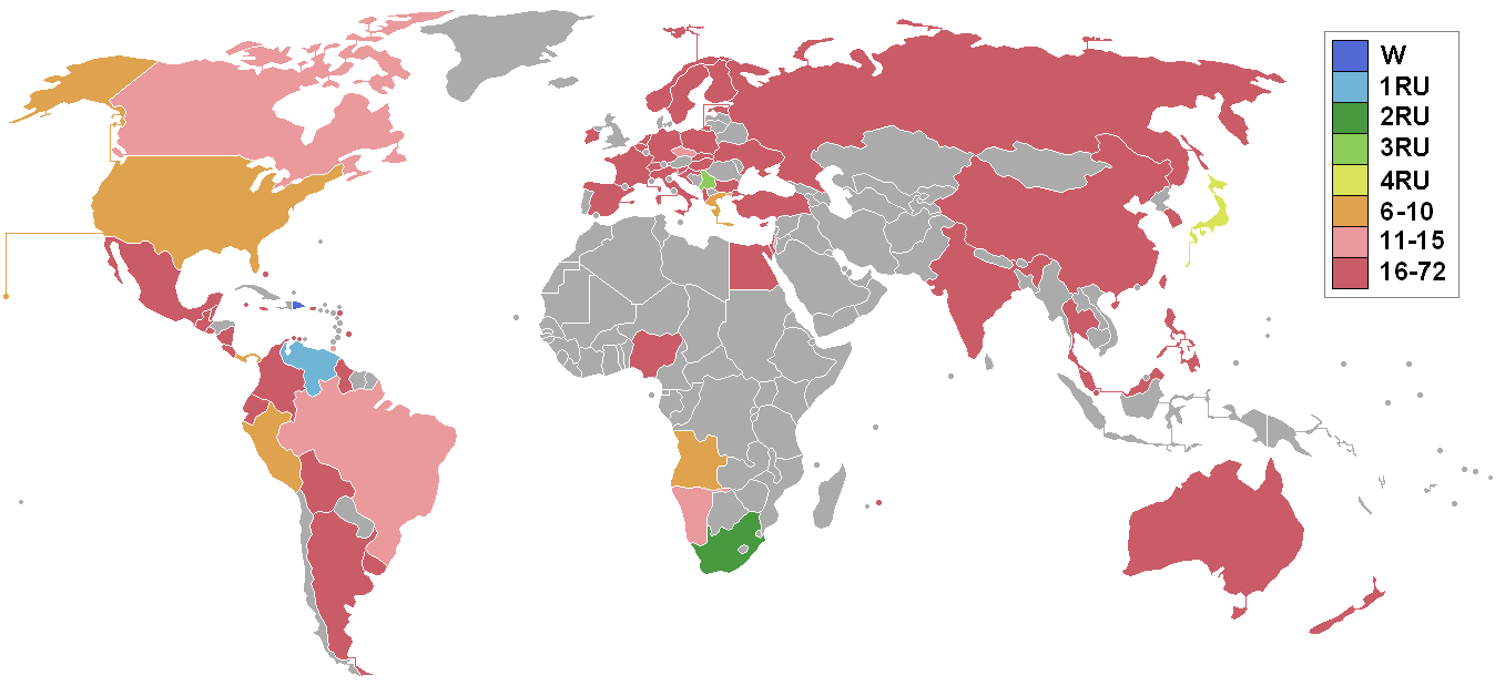 Страны участвовавшие в конкурсе Мисс Вселенная 2003